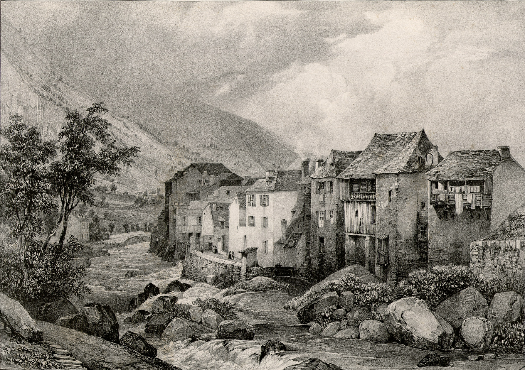 Lithographie. Vue prise à Cauterets (Hautes-Pyrénées). Publié en 1835.